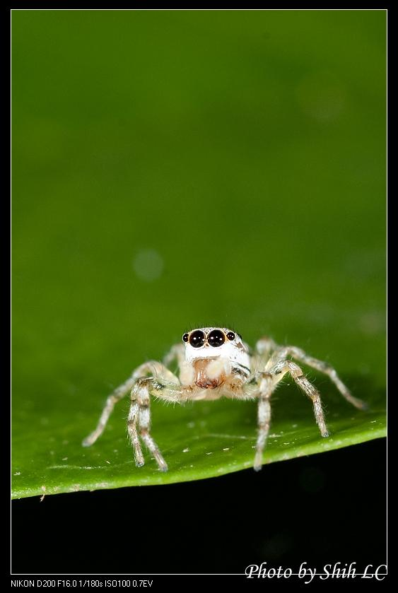 眼鏡黑條蠅虎 Phintella sp. nr versicolor